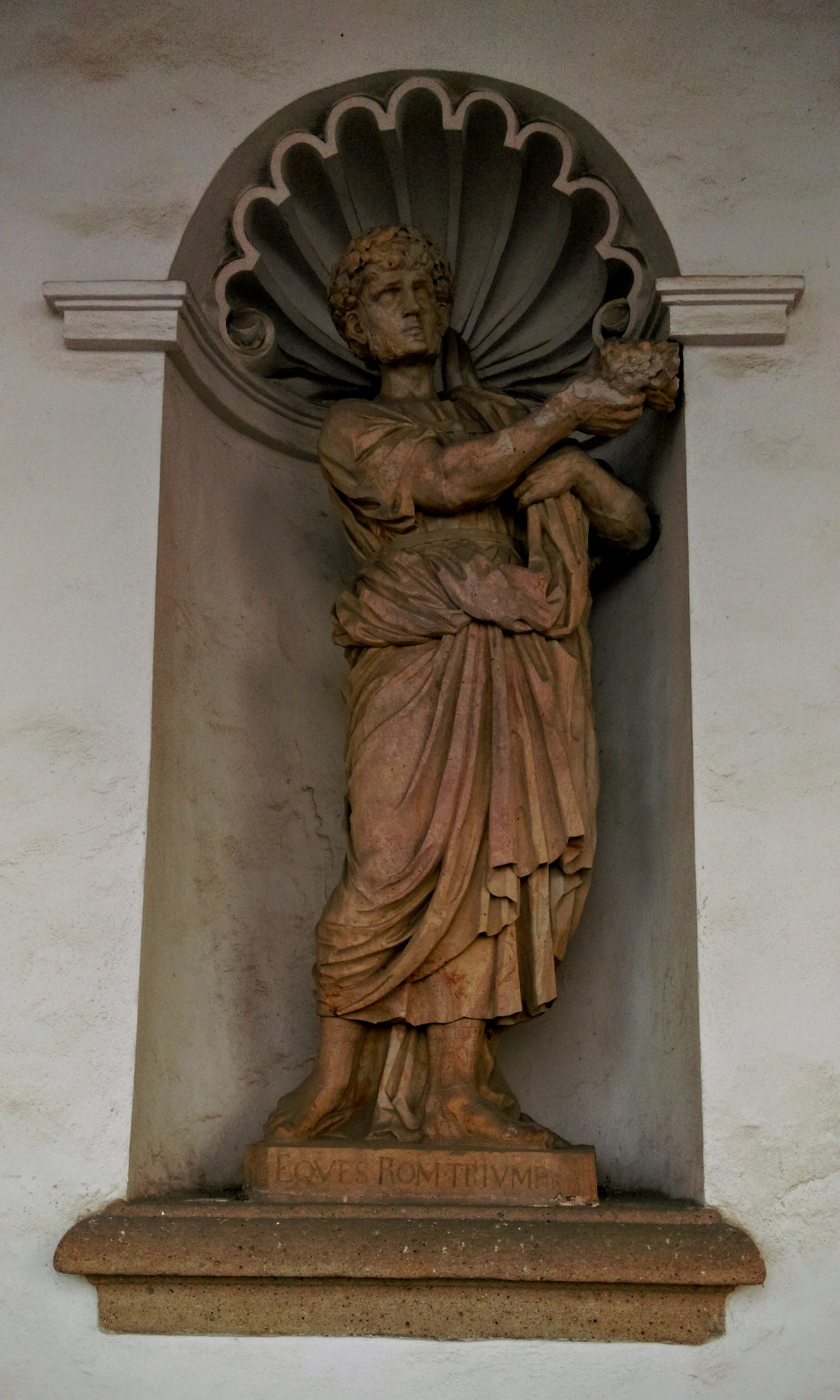 Eqves Rom Trivmp - socha v kolonádě Květné zahrady v Kroměříži